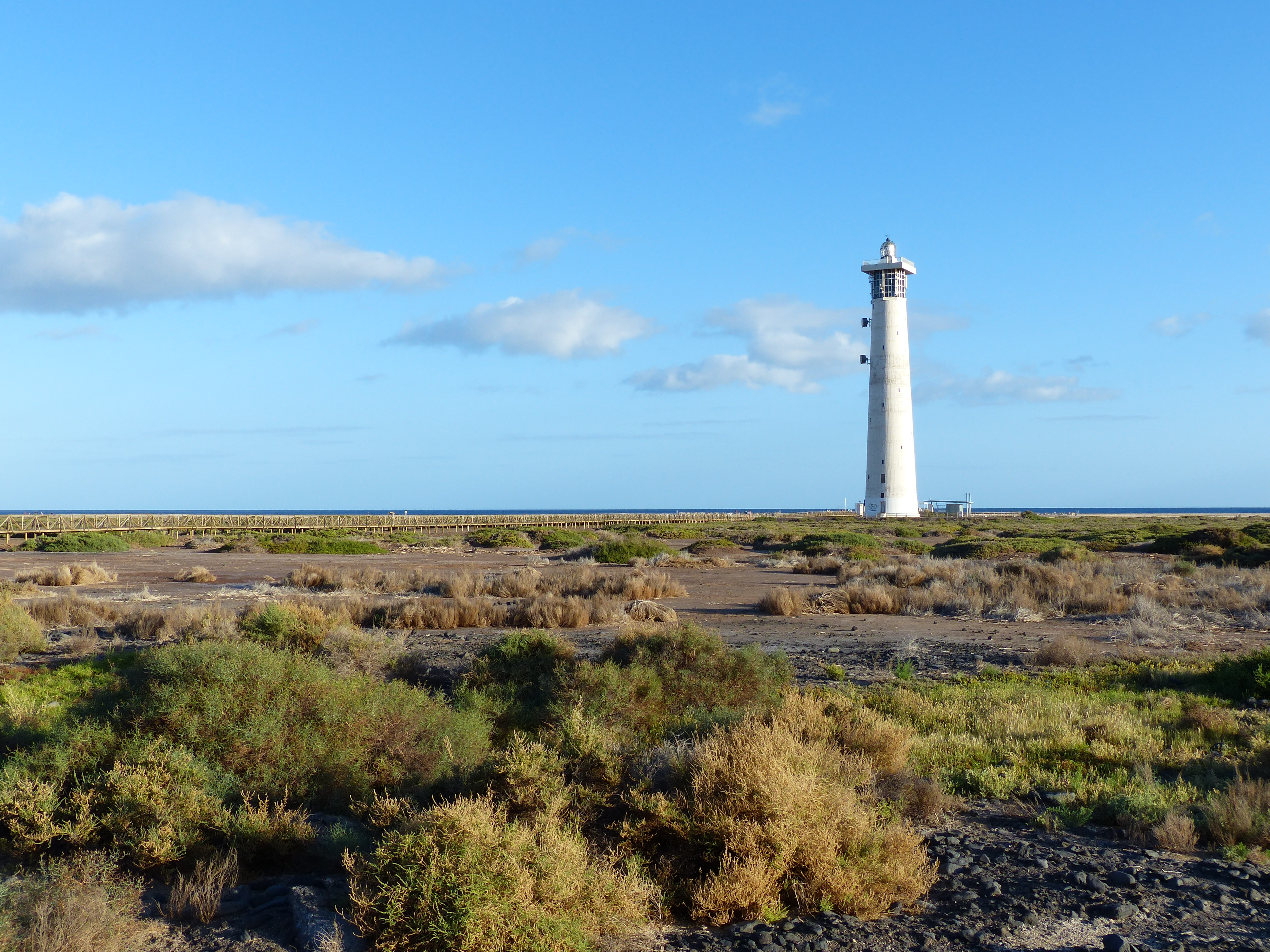 Leuchtturm und Naturschutzgebiet der Salzwiesen in Morro Jable Fuerteventura